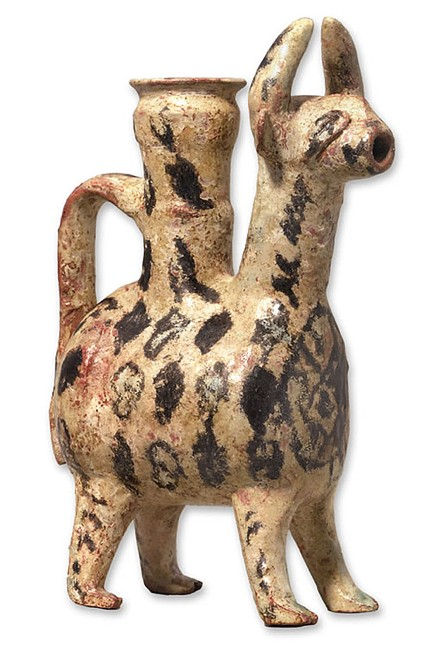 Cerámica zoomorfa de Medina Azahra